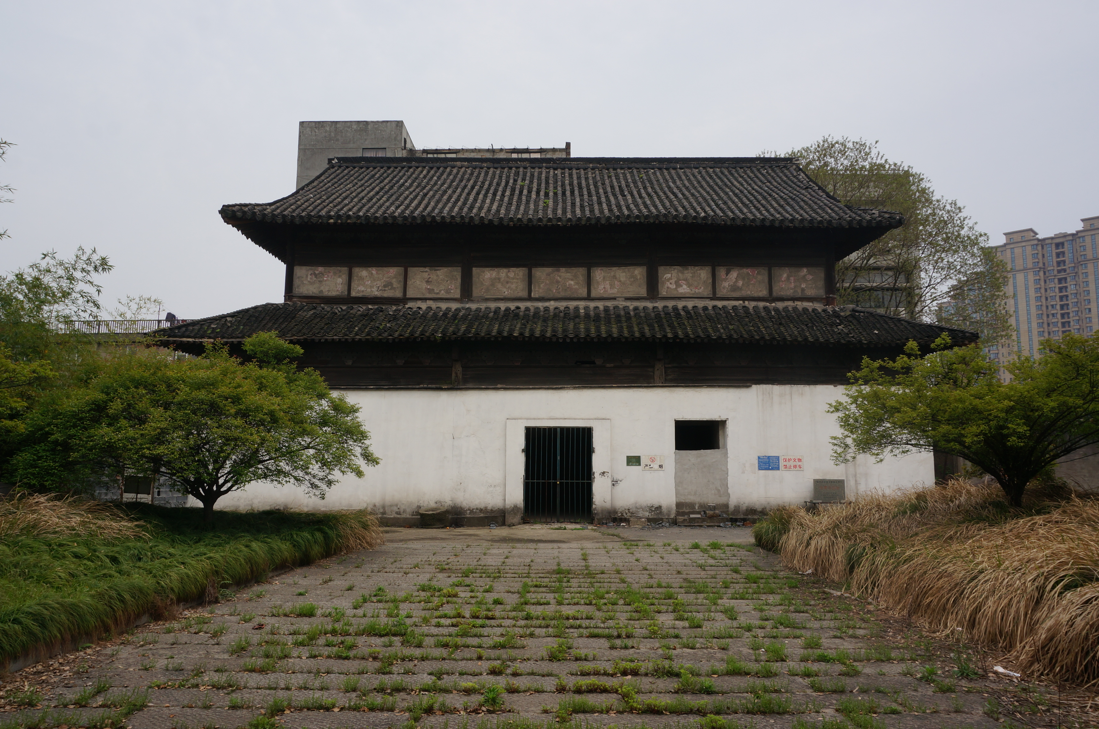 海潮寺天王殿，北面。